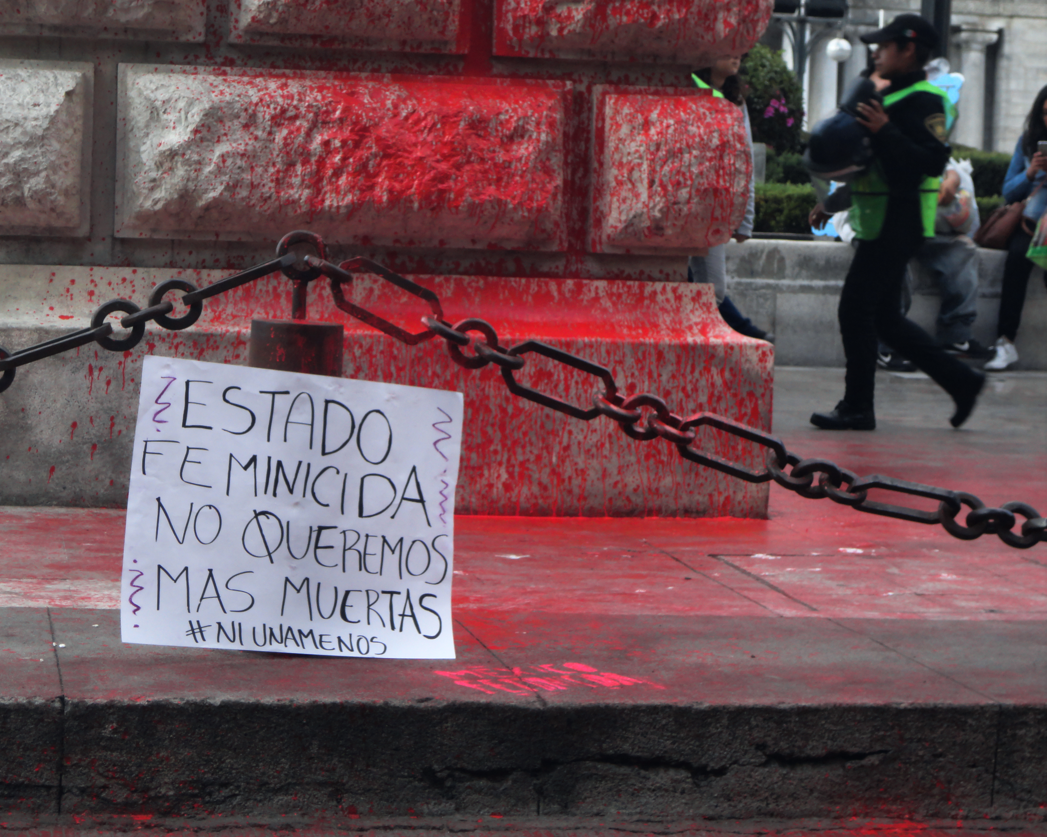 Protesta en contra del feminicidio en México. Ciudad de México.